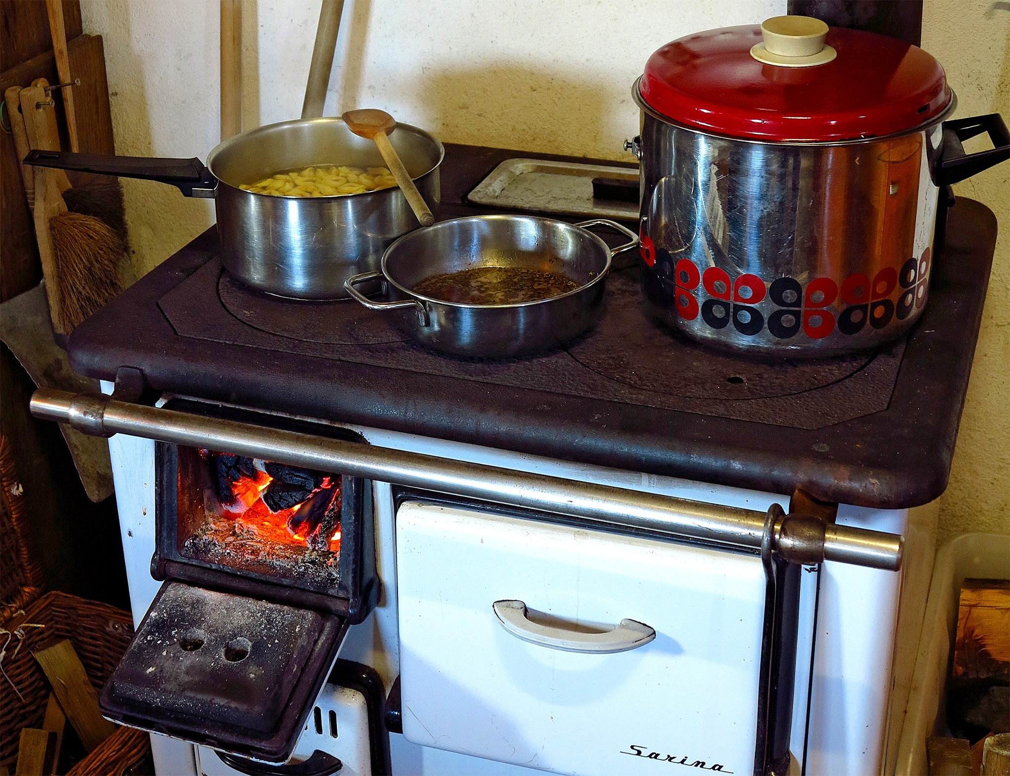 Rifugio Alpe Fiorasca, Val Bavona TI, Schweiz